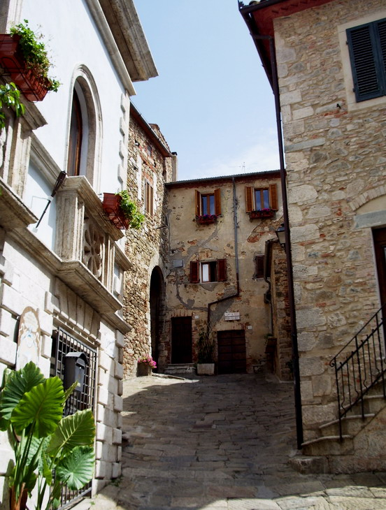 Centro storico Montemerano (GR), foto 18/08/2007